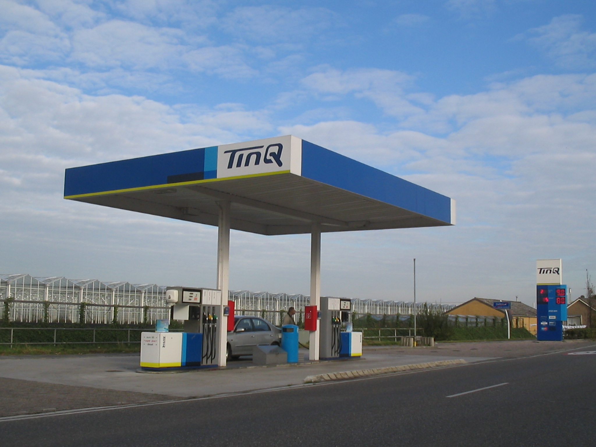 Tinq gazstation, Delfgauw, 8 november 2005